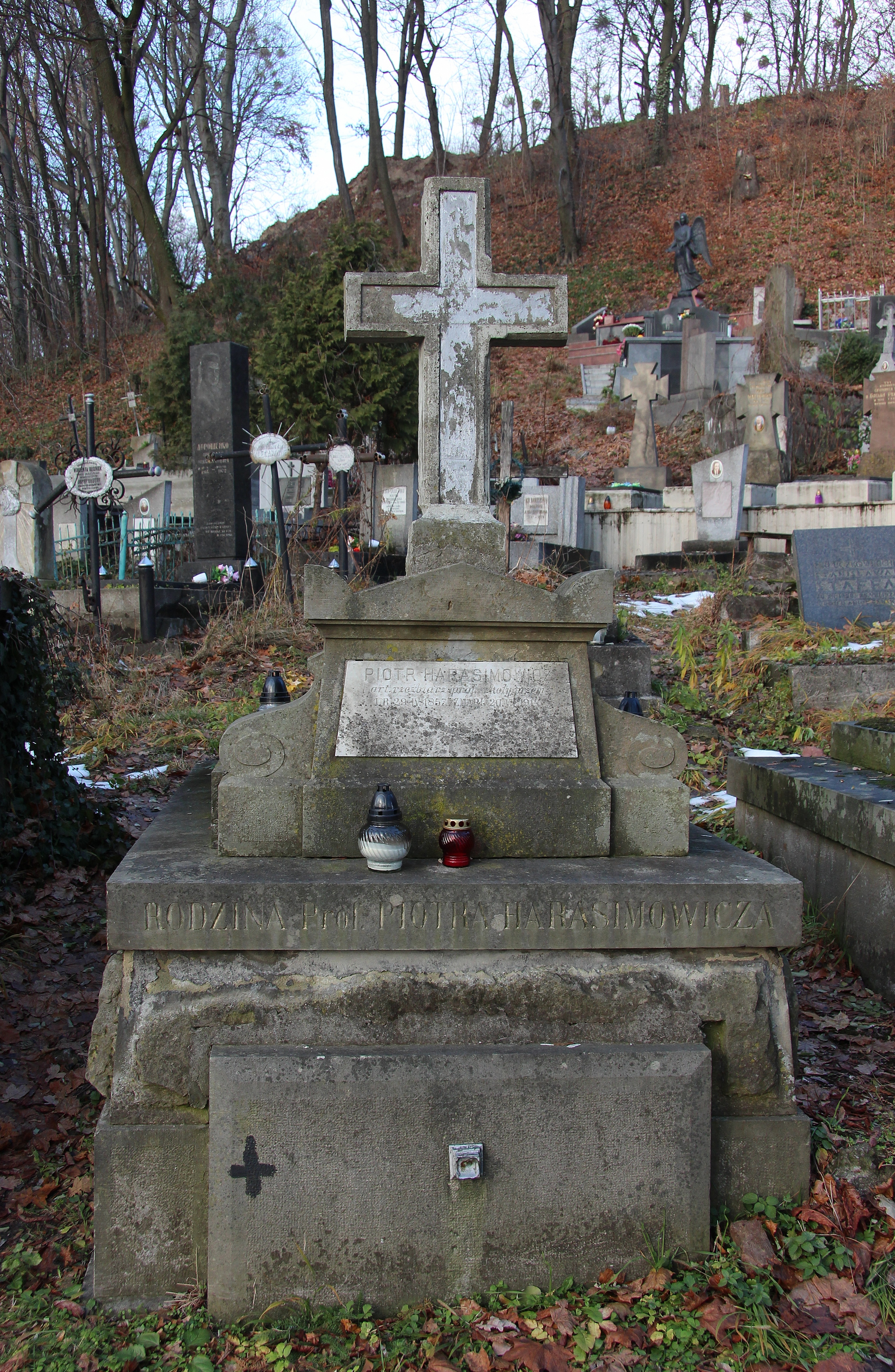 Гробівець Гарасимовичів.Личаківський цвинтар , поле № 35.